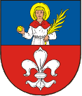 znak okce